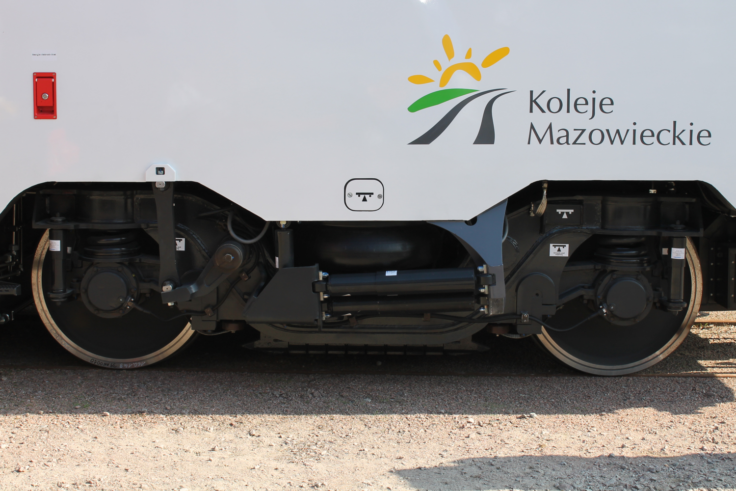 Wózek środkowego wagonu piętrowego Pesa Sundeck 416B-002 podczas targów Trako 2015. The making of this document was supported by Wikimedia Polska Association, within Wikigrant no. WG 2015-34.